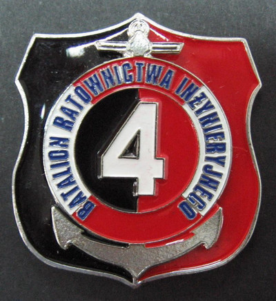 Odznaka pamiątkowa 4 Batalionu Ratownictwa Inżynieryjnego